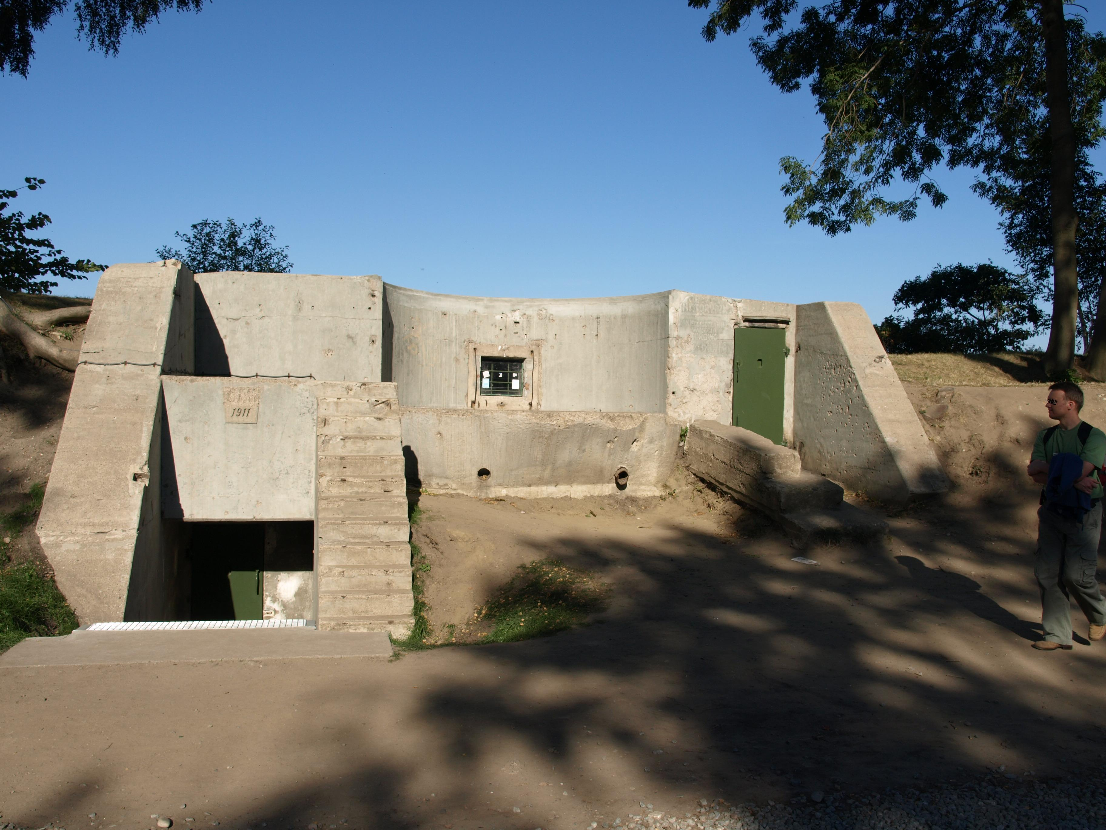 Nadbrzeżny fort z 1911 r. na gdańskim półwyspie Westerplatte.